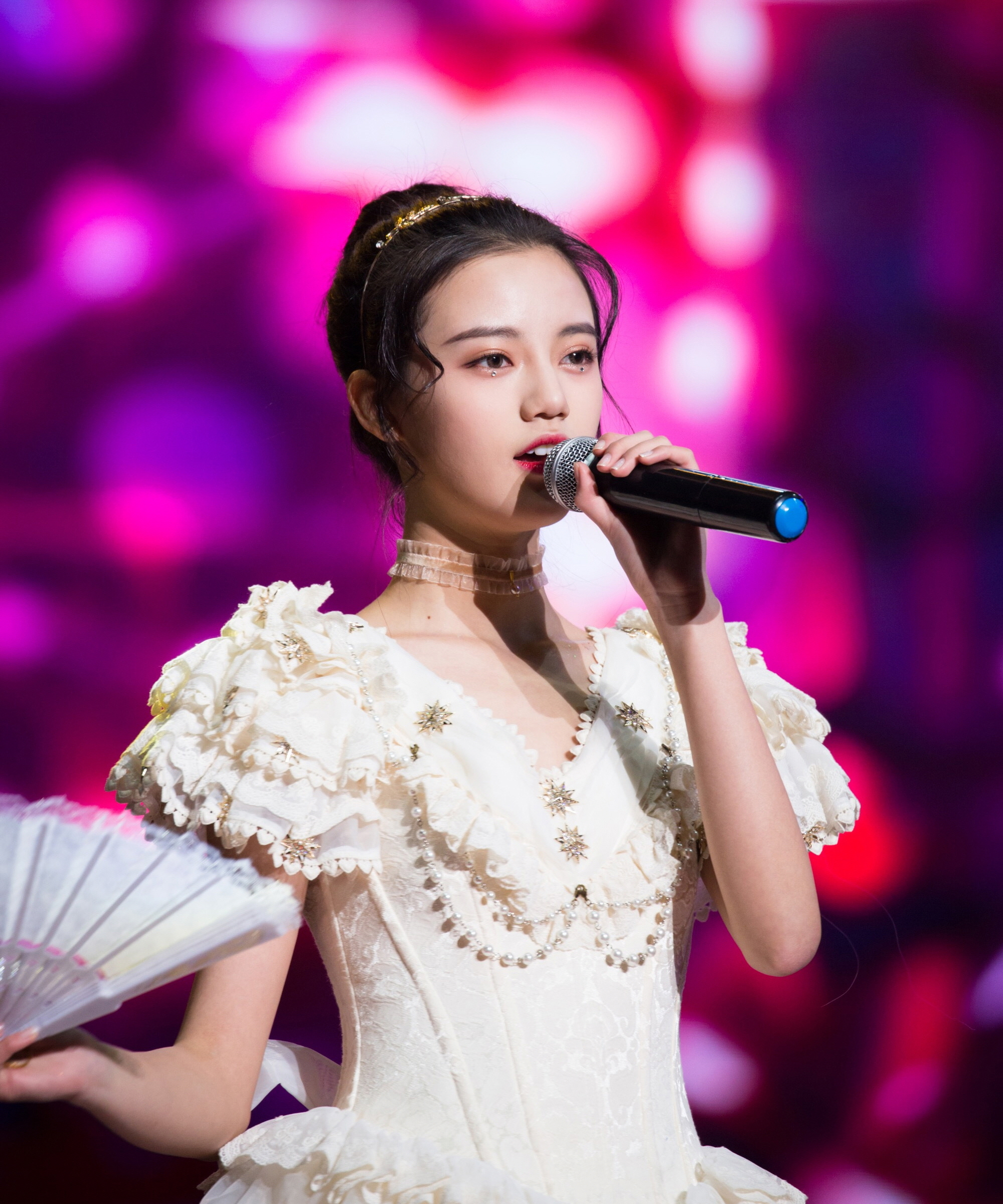 b50金曲大赏 木偶 返图